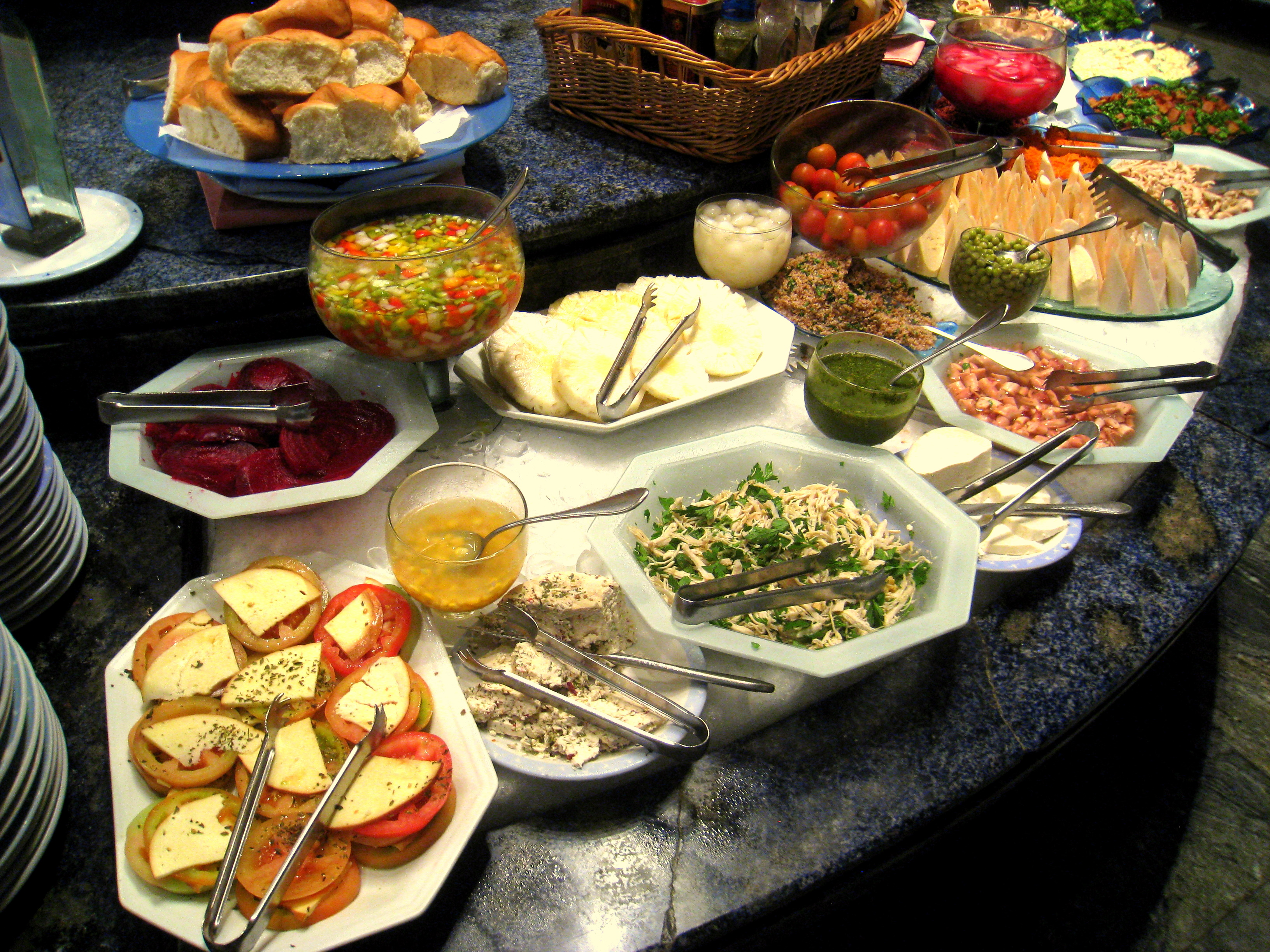 Cuisine of Brazil - Campinas, SP, Brazil.